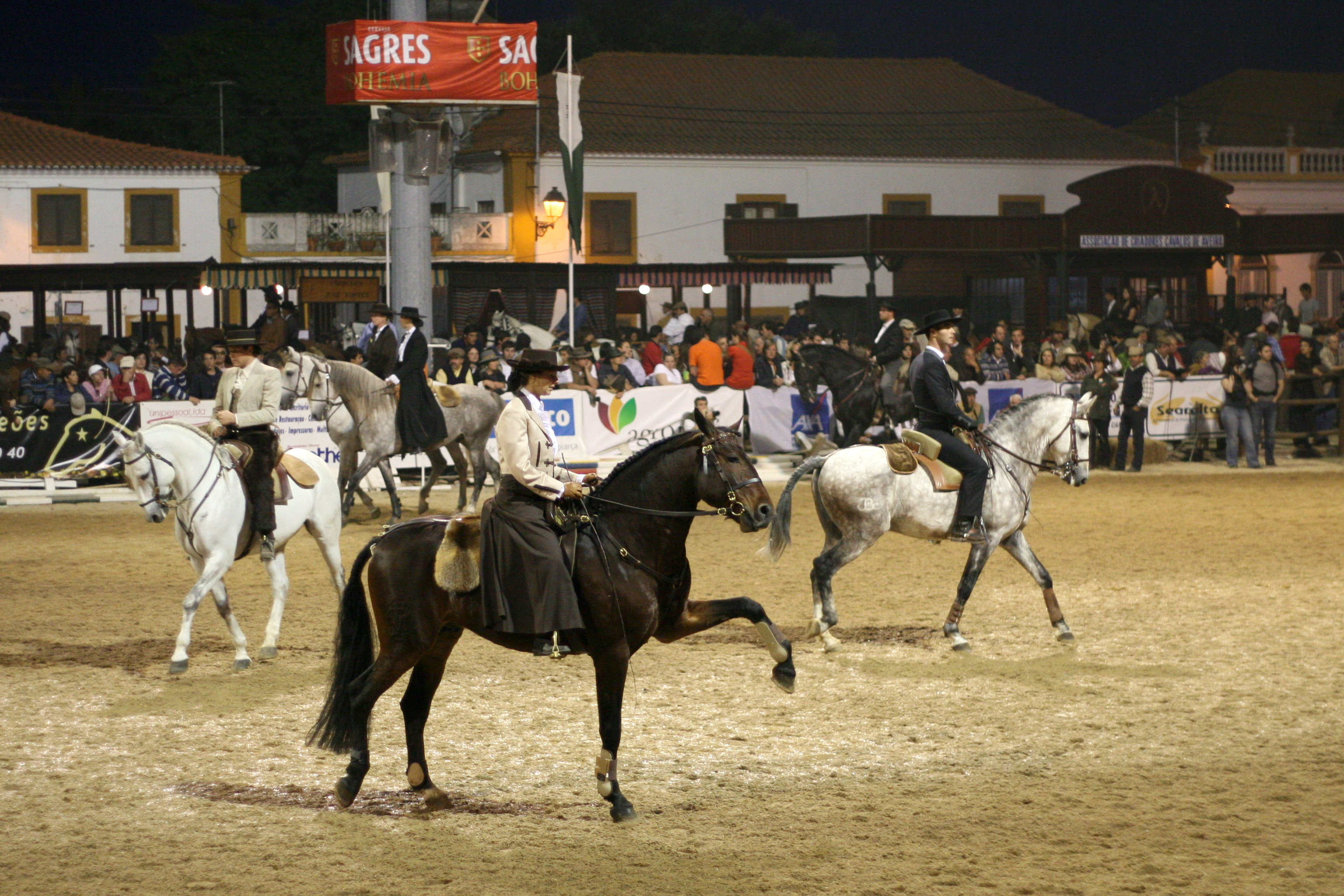 Pferdemesse „Feira Nacional do Cavalo“ in Golegã, Portugal